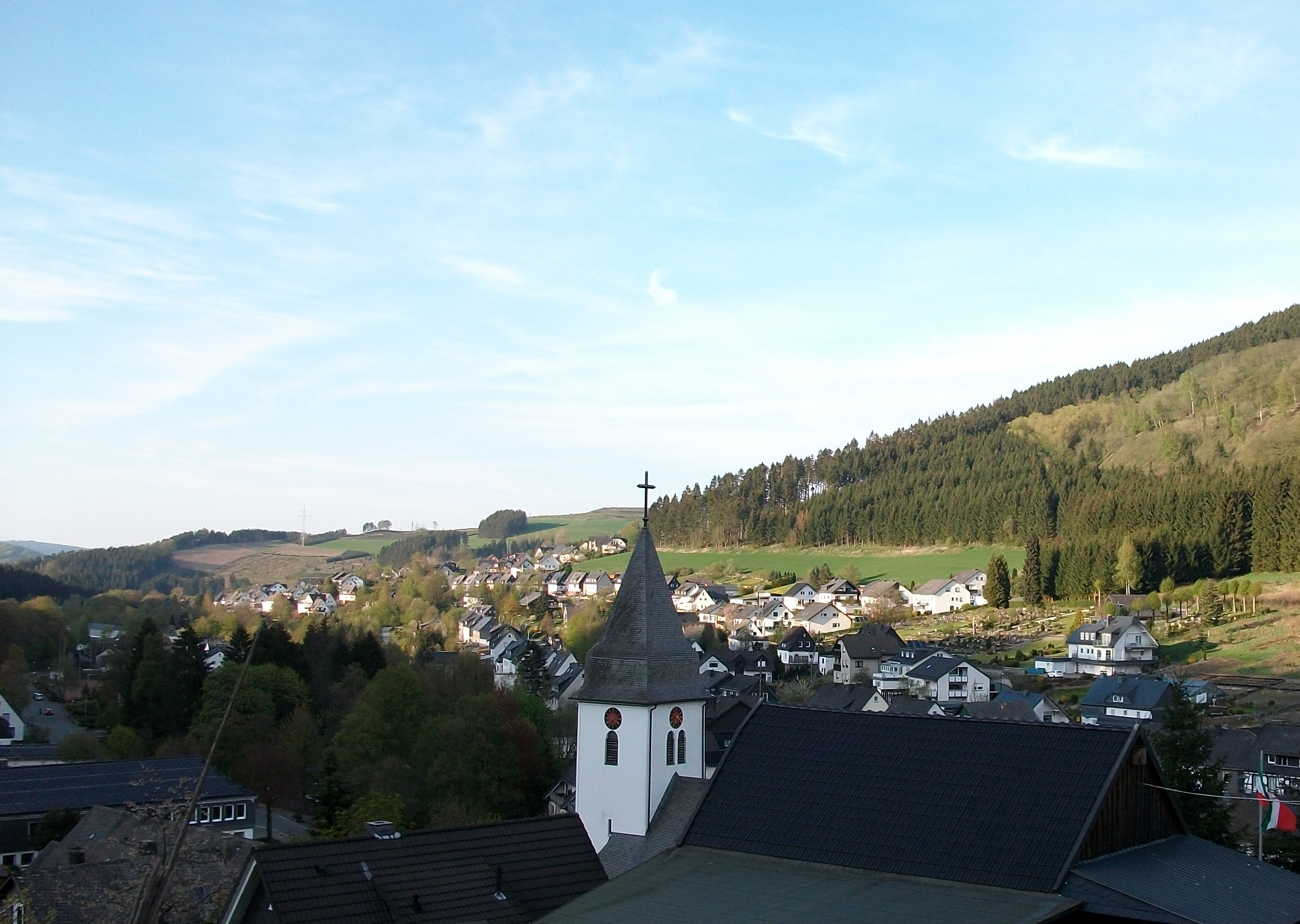 Bestwig-Ramsbeck (Germany)